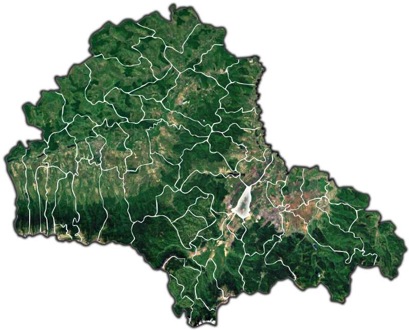 Ghimbav jud Brasov.